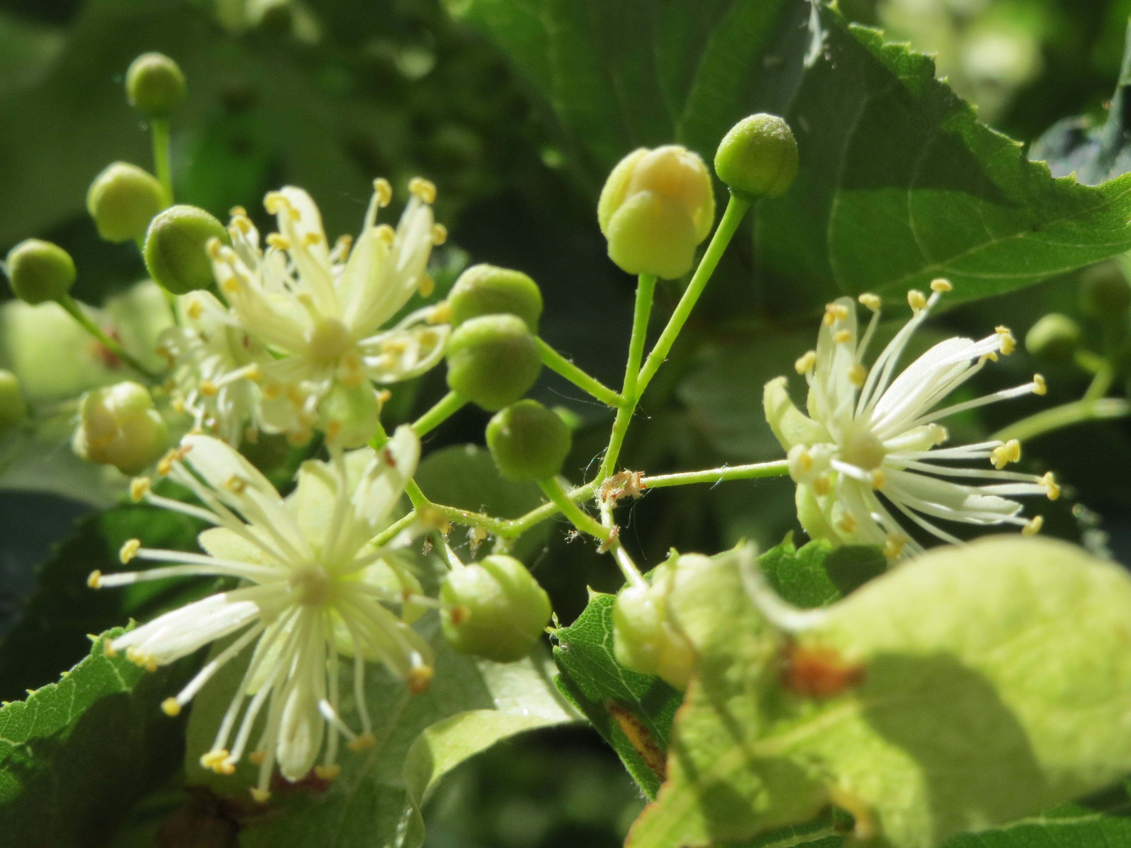 Winterlinde (Tilia cordata) in der Berlinallee in Hockenheim